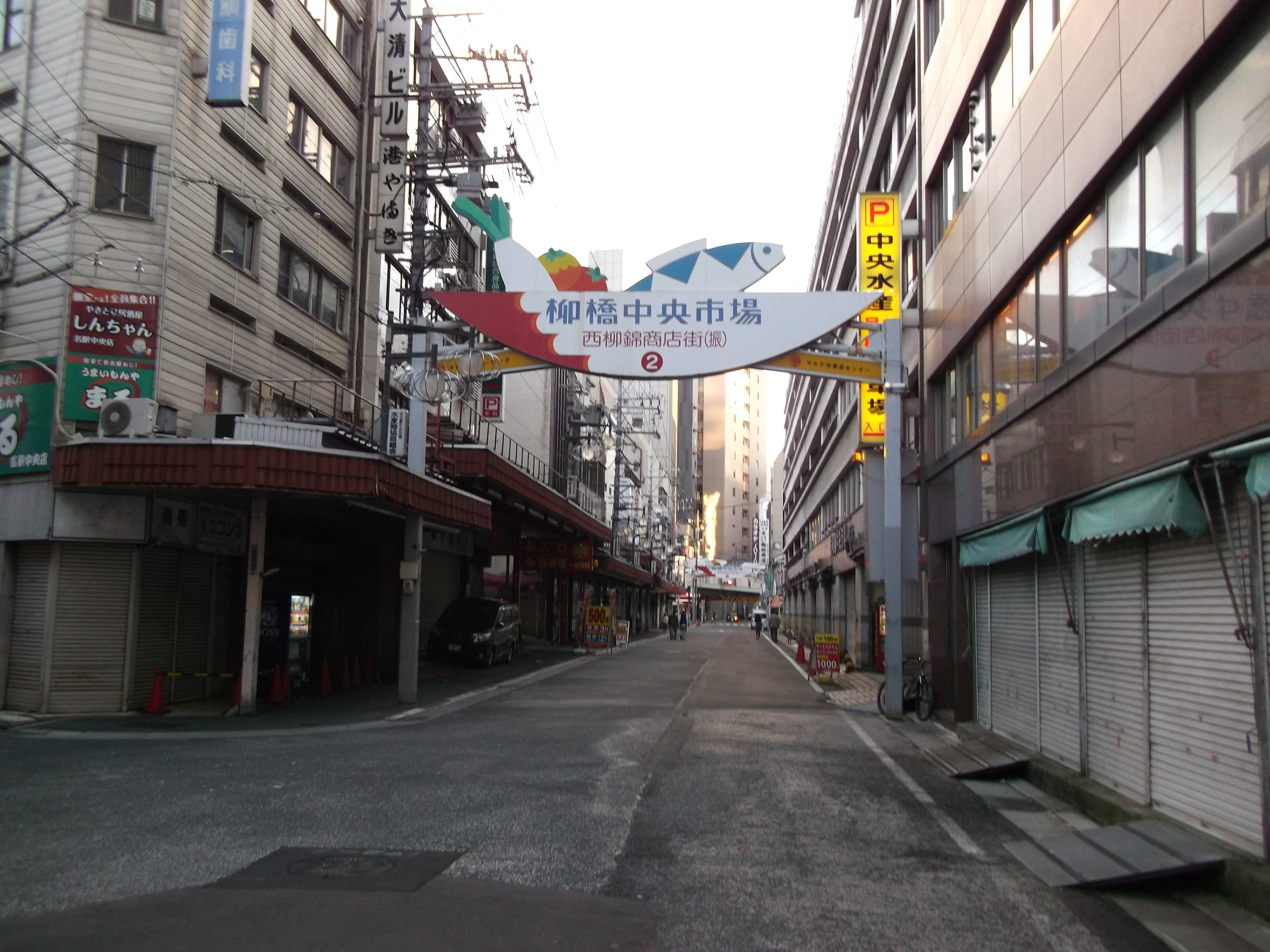 名古屋市中村区名駅の柳橋中央市場の様子（休場中）。